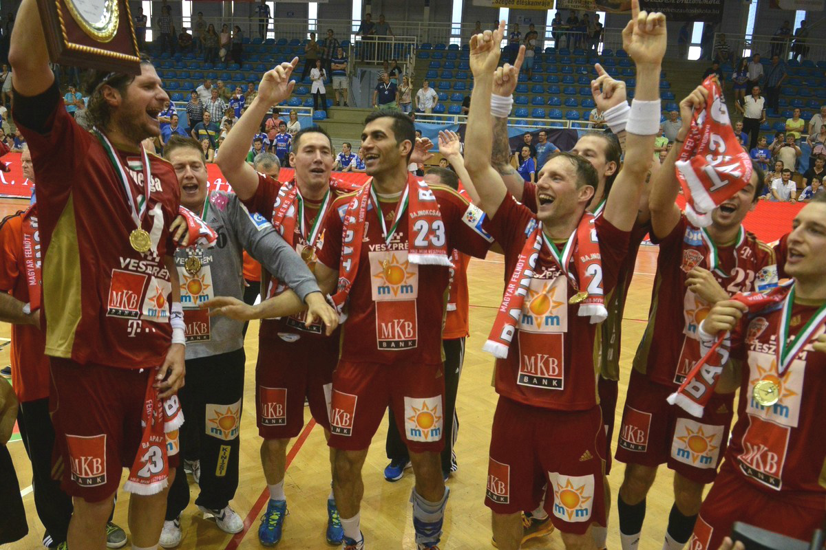 MKB-MVM Veszprém kézilabda csapat a 2015-ös magyar bajnoki döntőn (Szeged, újszegedi sportcsarnok)